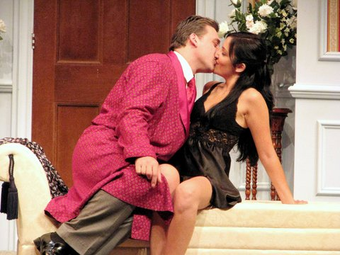 תקלה קלה בית ליסין טלי בן-יוסף עם ליאור אשכנזי